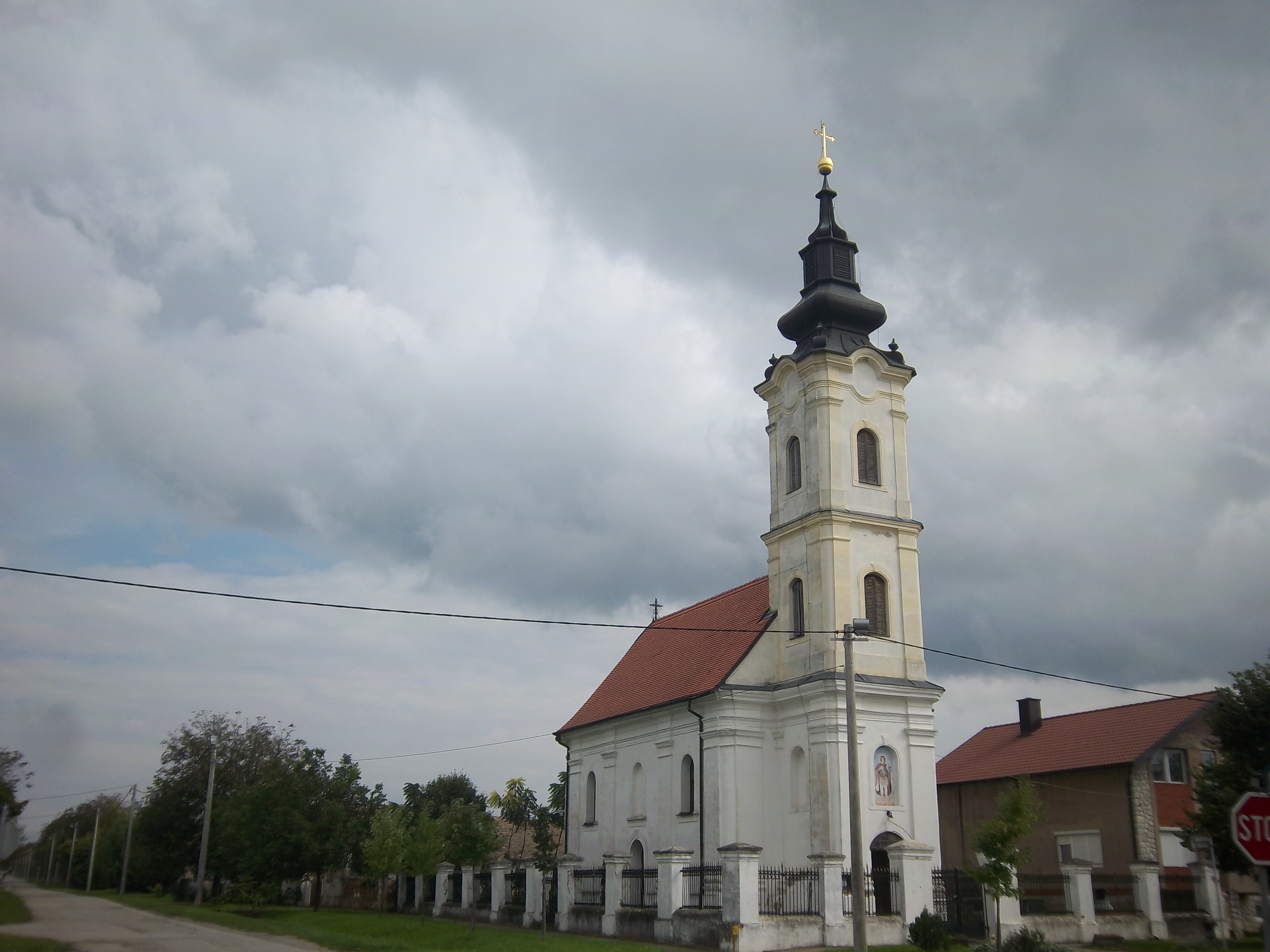 Српски (ћирилица): Српска православна црква у Товарнику